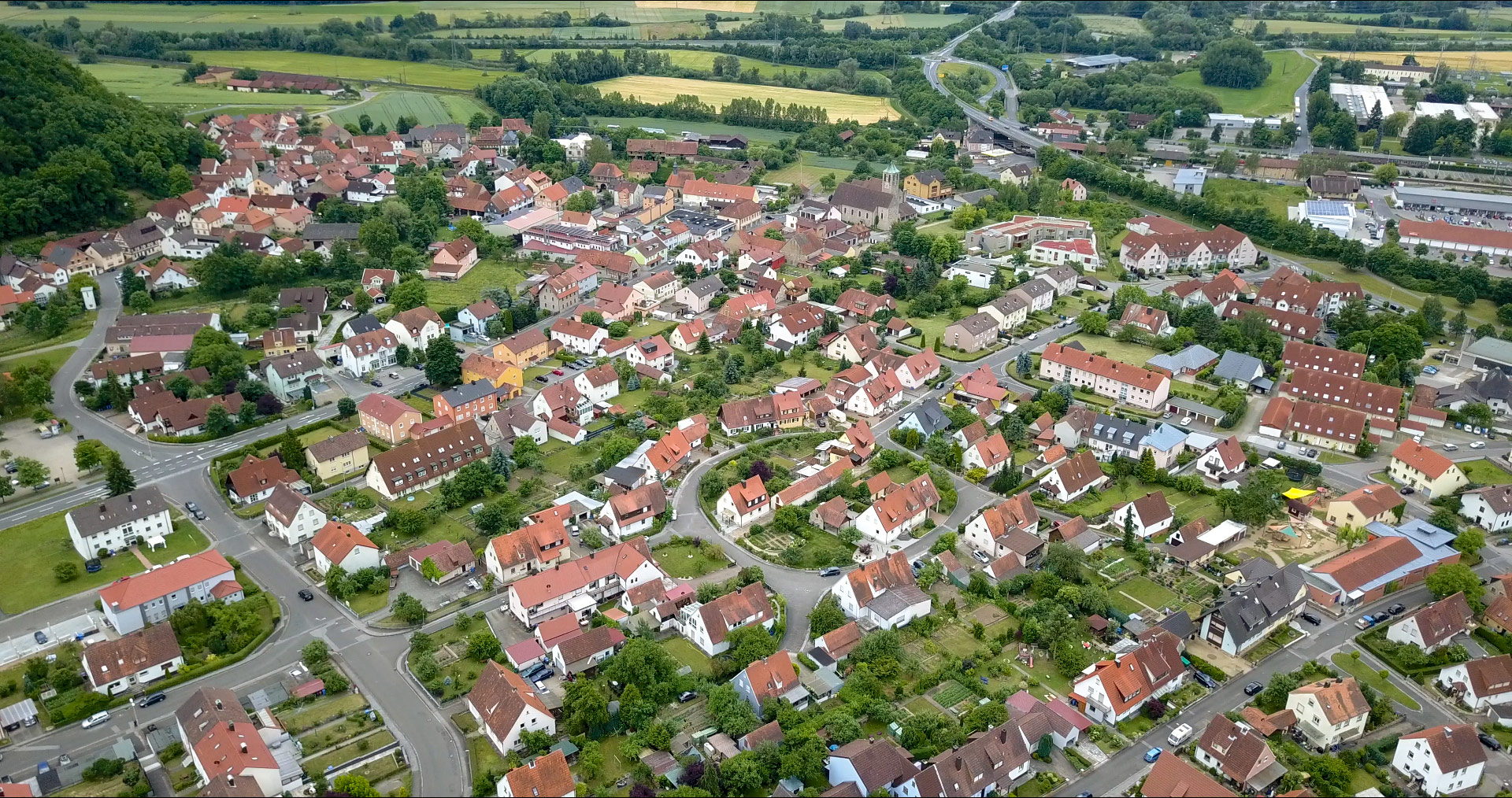 In dieser Drohnenaufnahme ist der Ortskern von Norden aus fotografiert. Links der Ausläufer des Ebelsbergs, am oberen Bildrand der Main, rechts die Bahnhof, Bildmitte oben die Kirche.